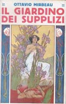 Couverture de Il Giardino dei supplizi, d'Octave Mirbeau (1848-1917)